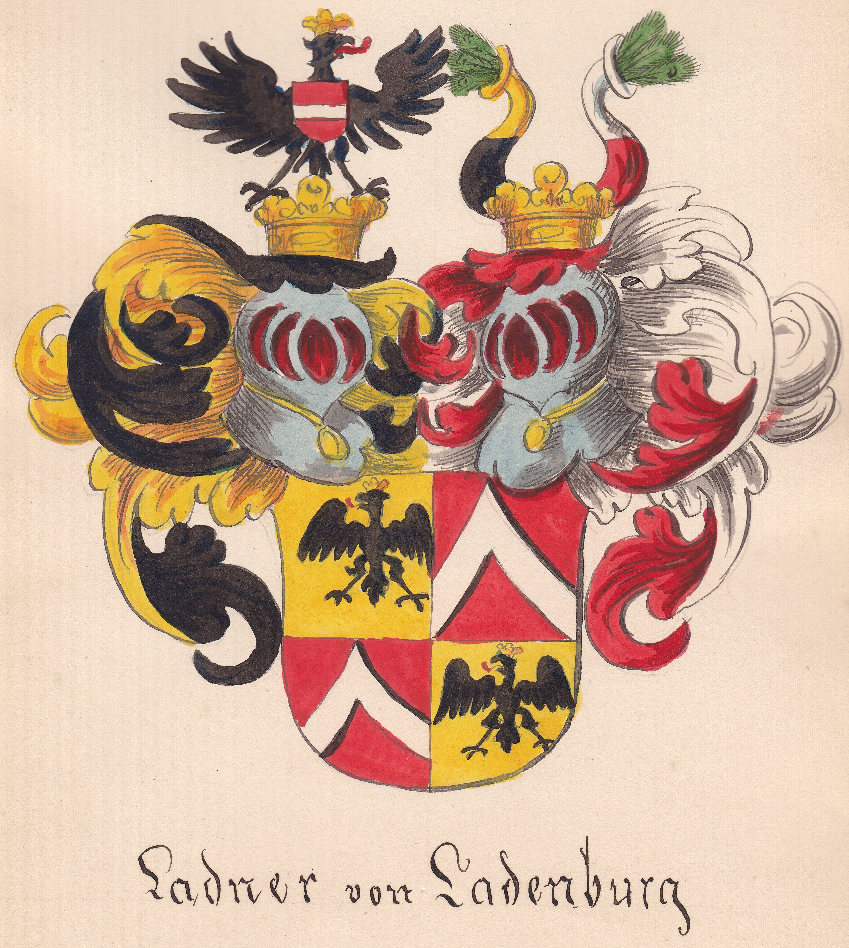 Wappen mit einem gevierten Schild, wobei sich im ersten und letzten goldenen Feld ein schwarzer gekrönter Sandadler (=Steinadler) sowie im zweiten und dritten, jeweils roten Feld ein silberner Sparrbalken befindet. Auf dem Schild ruhen zwei gekrönte Helme. Der Erste zeigt den Adler wie im Schild, allerdings trägt dieser noch ein rotes Schild mit einem silbernen Querbalken. Der zweite Helm trägt zwei Büffelhörner, wobei das Rechte unten schwarz und oben golden, das andere unten rot und oben silbern ist; beide Büffelhörner tragen in ihren Öffnungen Pfauenfedern.